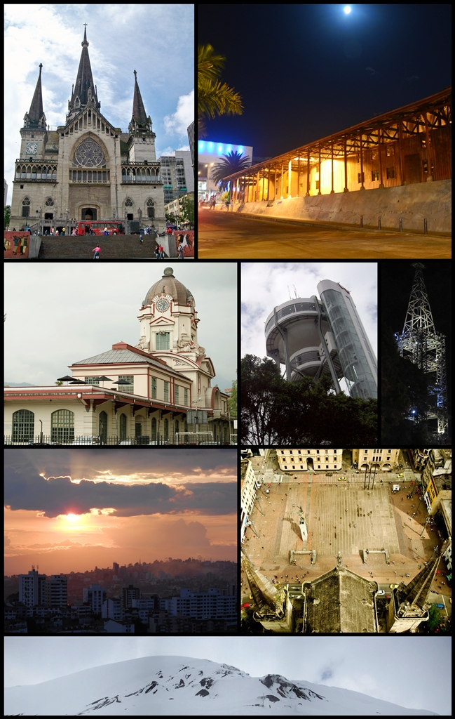 Manizales-Colombia